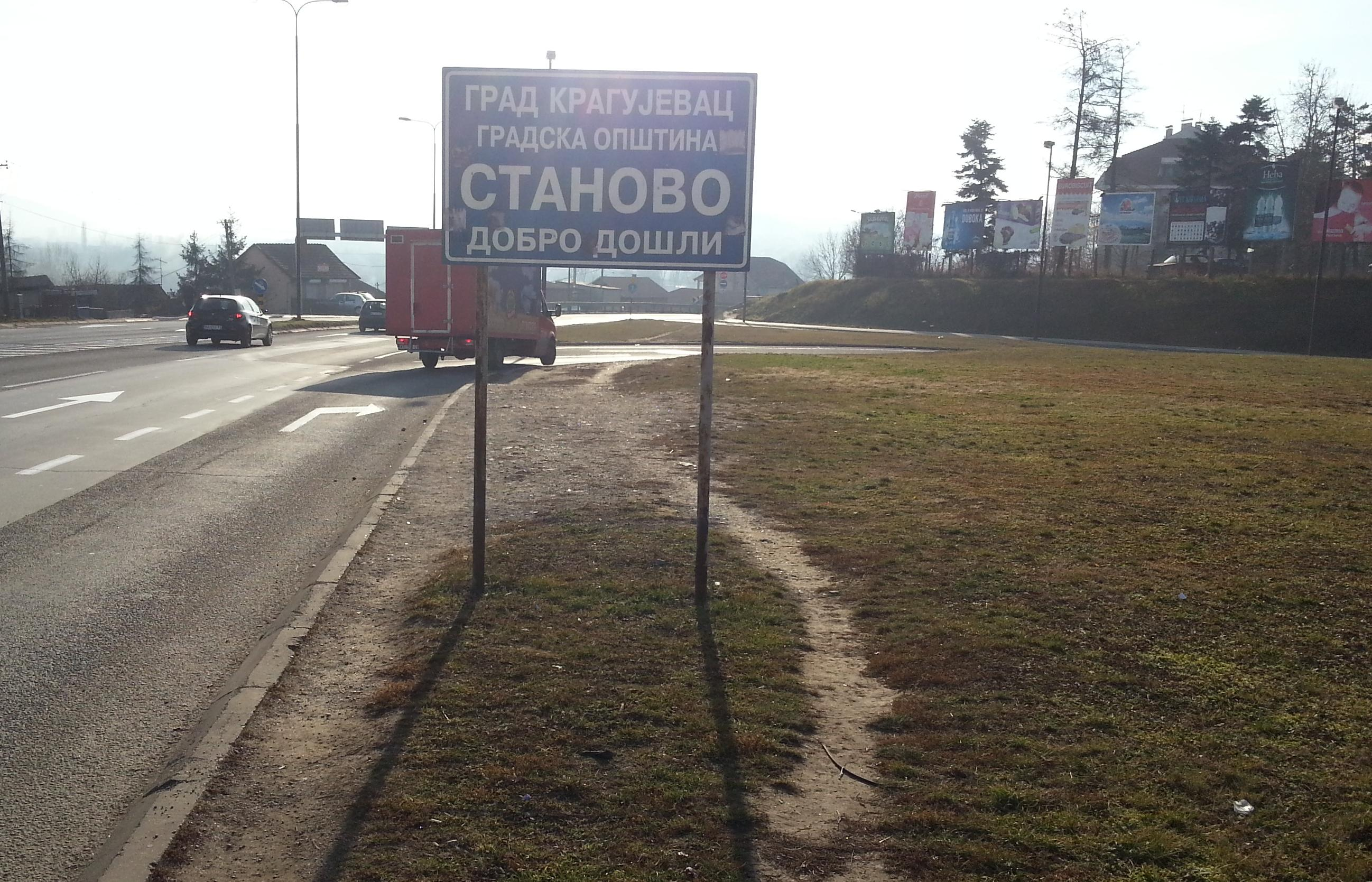 Oznaka za opštinu Stanovo